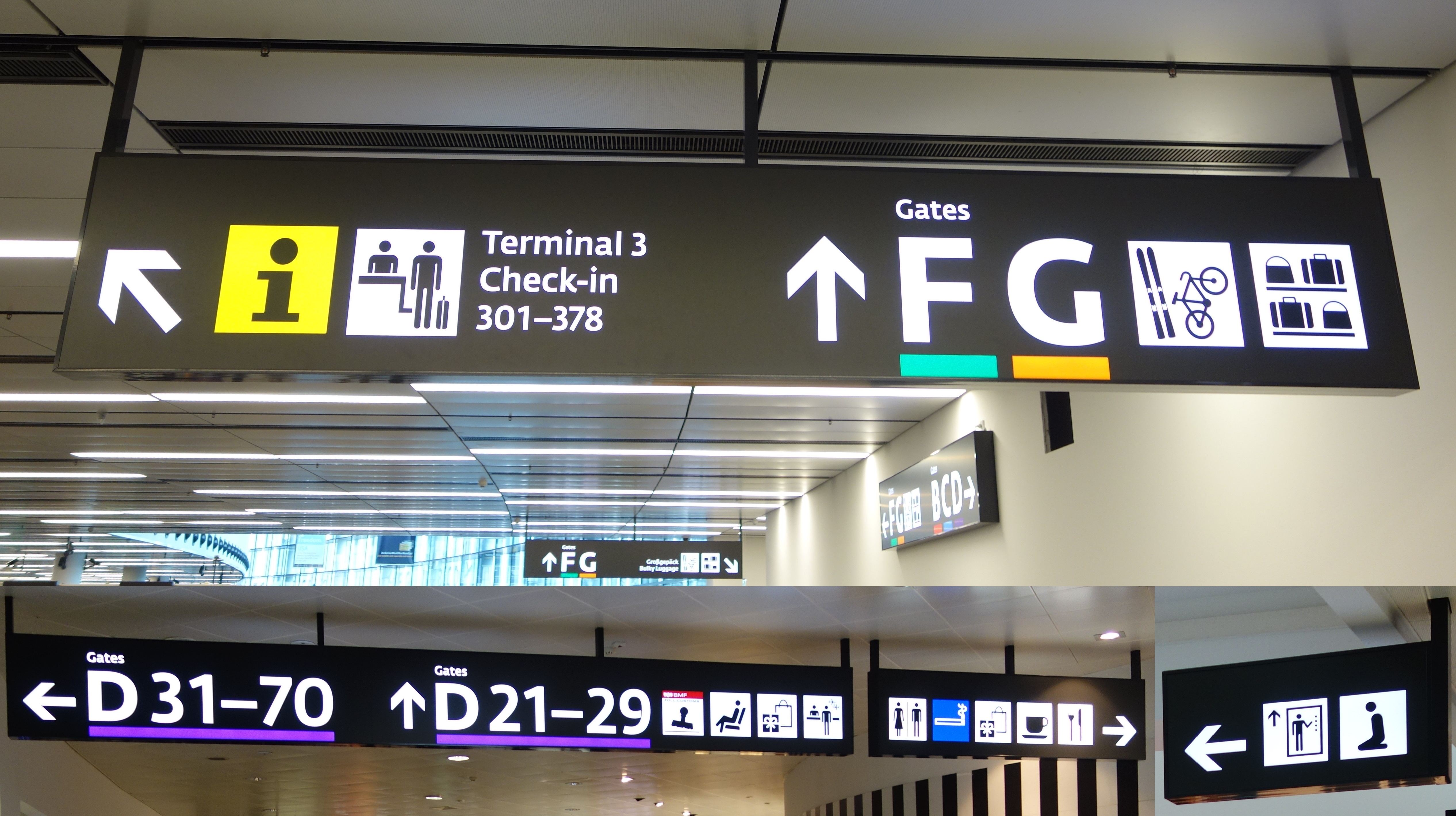 Unterschiedliche Hinweistafeln am Flughafen Wien.